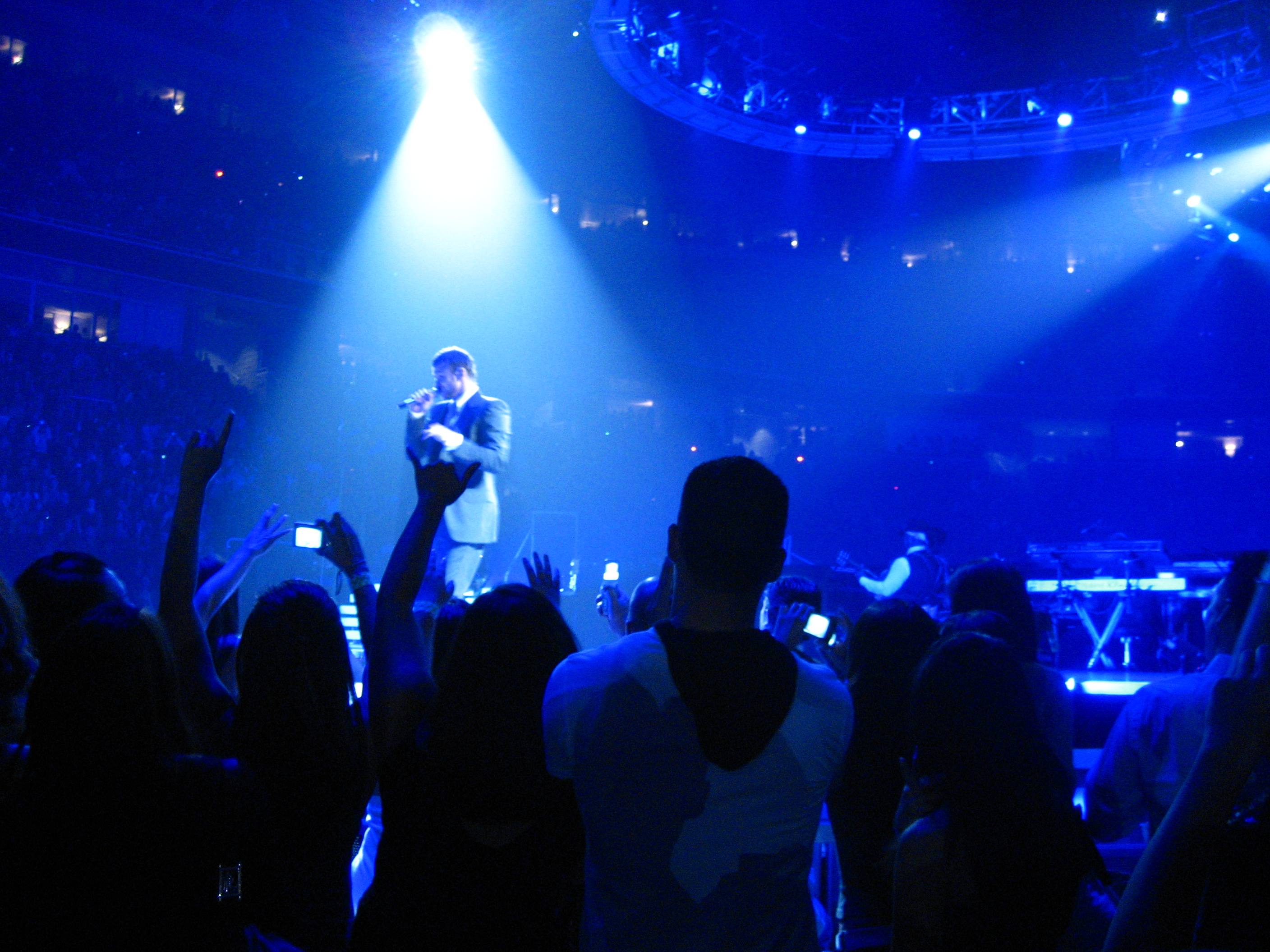 El concierto de Justin Timberlake en el 'HP Pavilion at San Jose' durante su gira FutureSex/LoveShow. San José, California, 23 de septiembre de 2007.